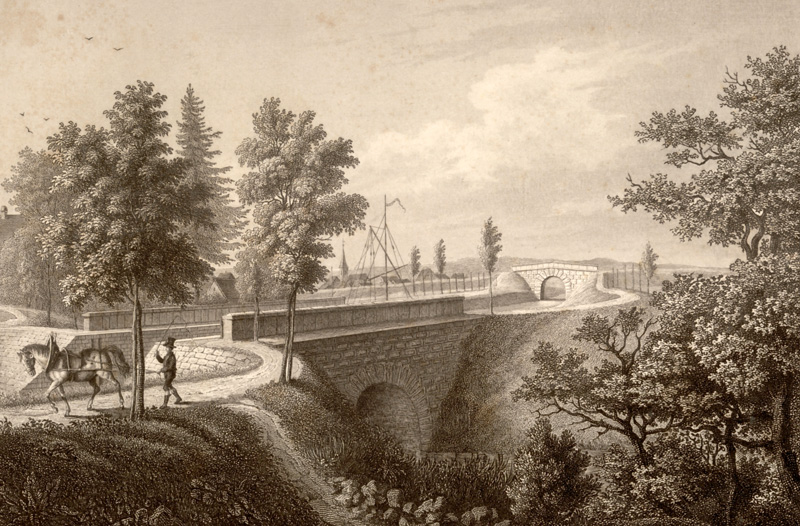 Der Gauch'sbach Brück = Kanal bei Kugelhammer. Stahlstich von Alexander Marx aus dem Buch Pittoreske Ansichten des Ludwig-Donau-Main-Kanals. Gezeichnet, auf Stahl gestochen und herausgegeben von Alexander Marx. 1845. Kupferstecher in Nürnberg.